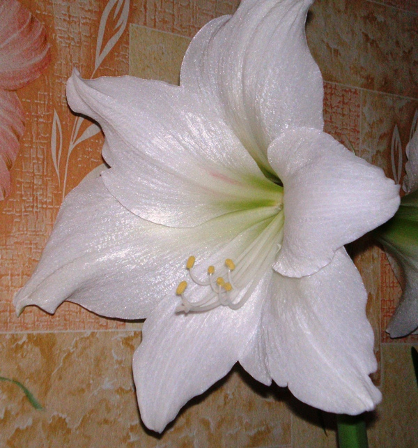 Meilenio žiedas Foto: Hugo.arg